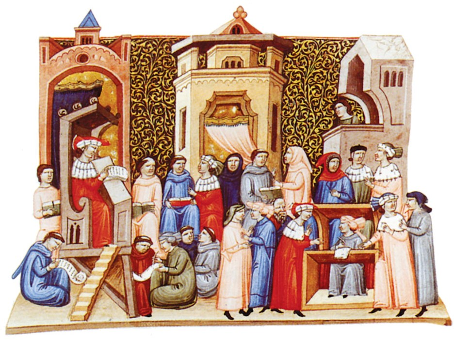 Miniatura italiana che ritrae una lezione universitaria durante il Medioevo.